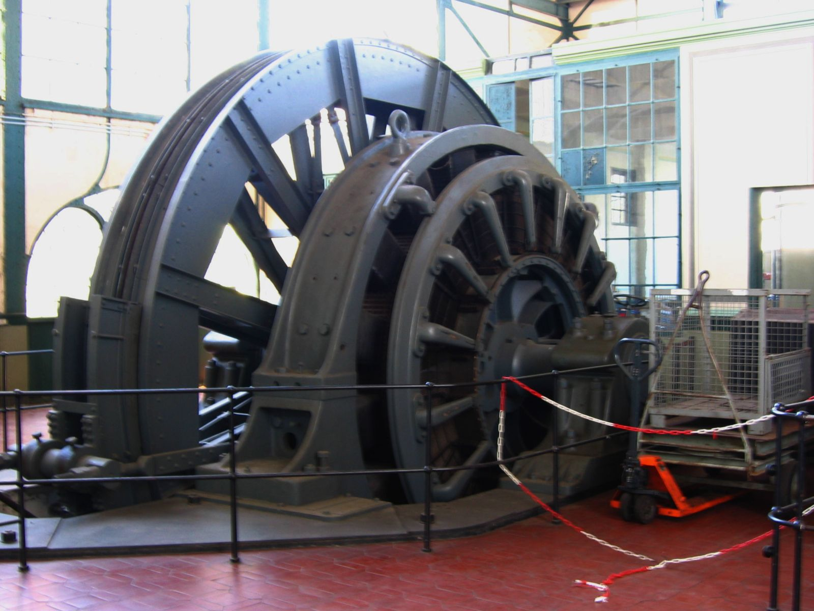 elektrische Fördermaschine Zeche Zollern 2/4, Dortmund-Bövinghausen eigene Aufnahme 04/2006